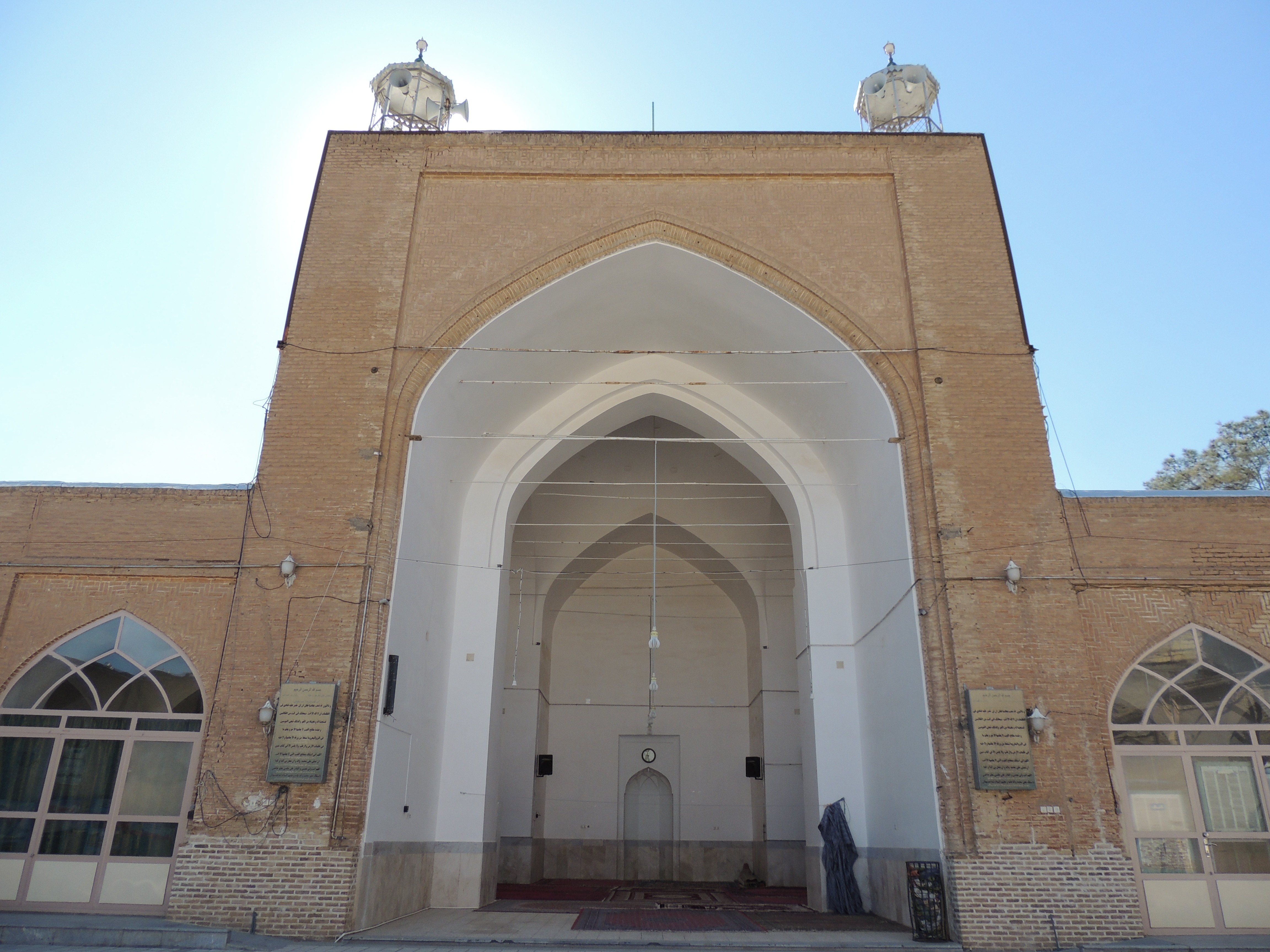 مسجد جامع خلیل‌آباد